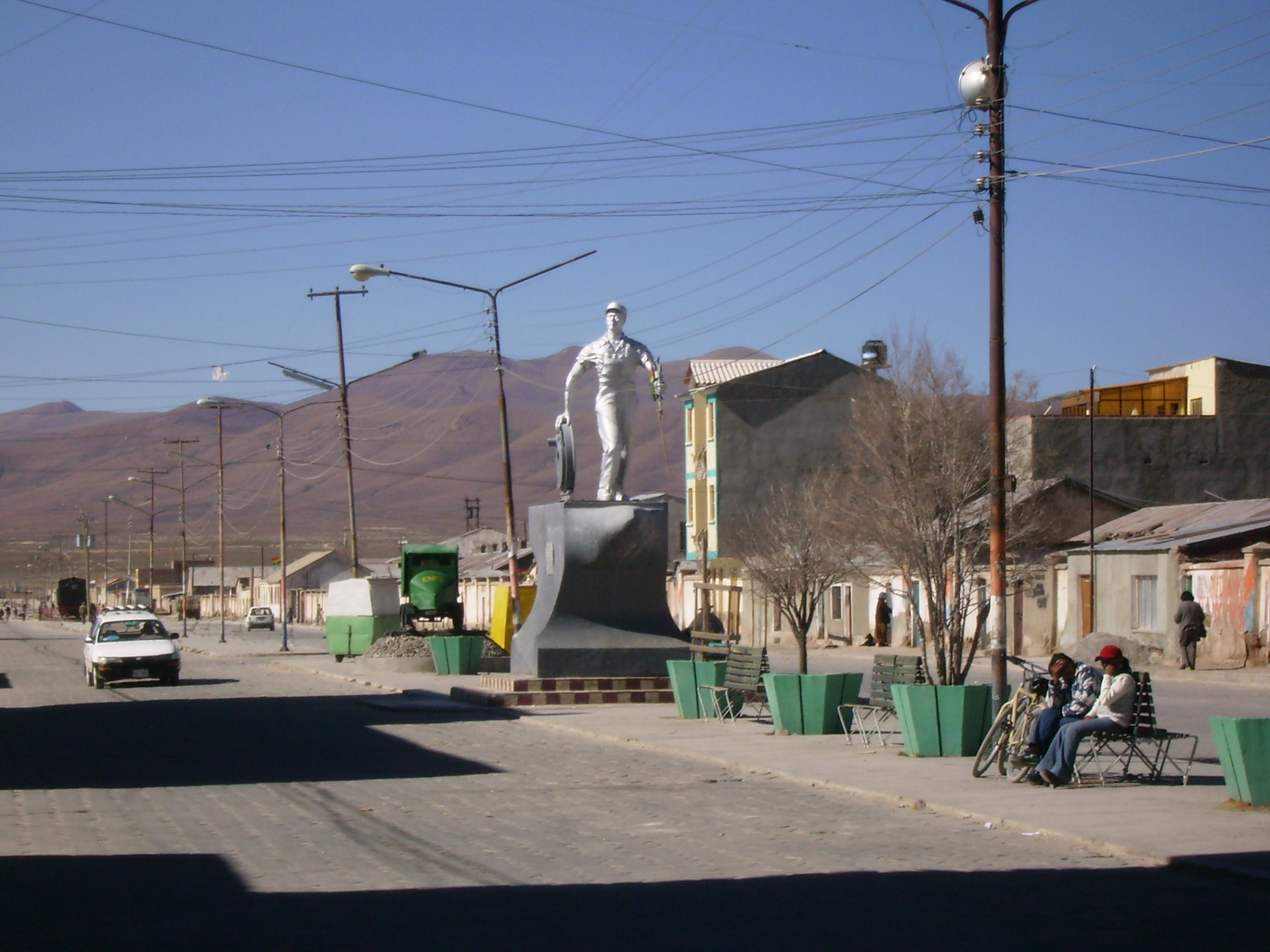 Memorial dos trabalhadores de metal - Uyuni - Bolivia